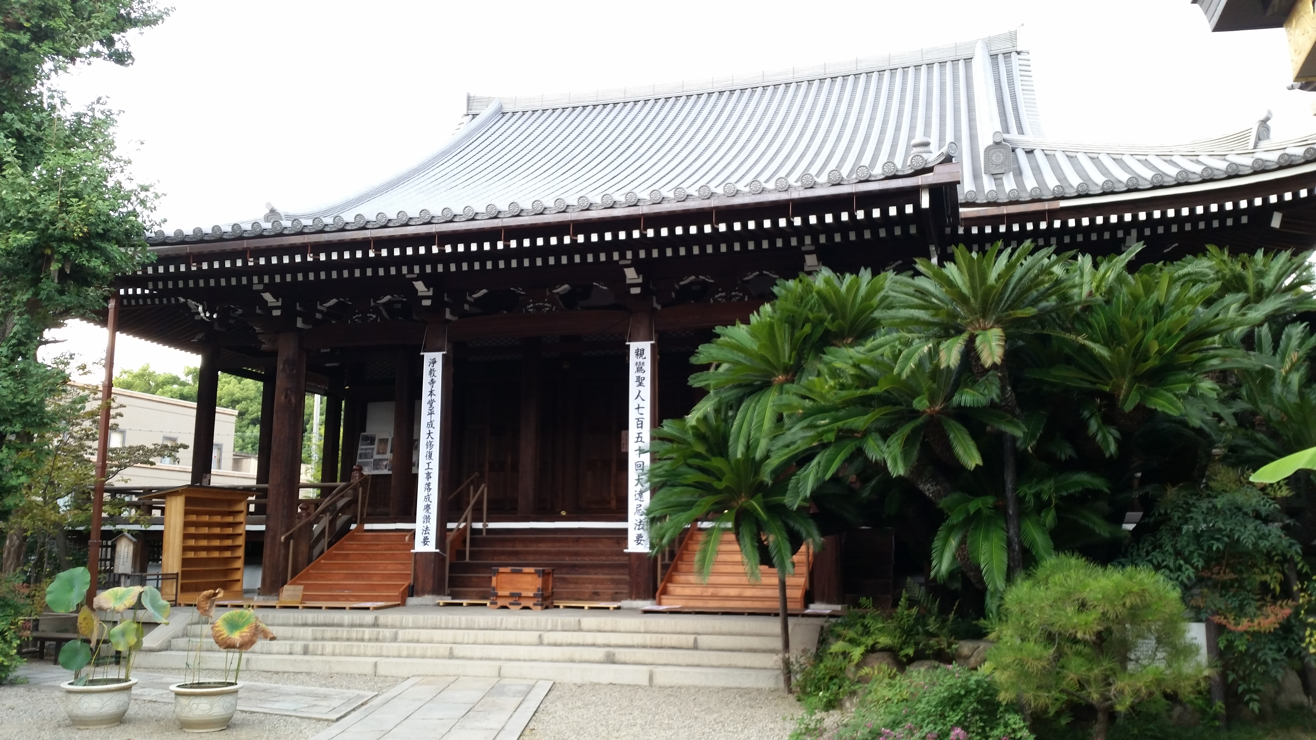 淨教寺本堂、奈良